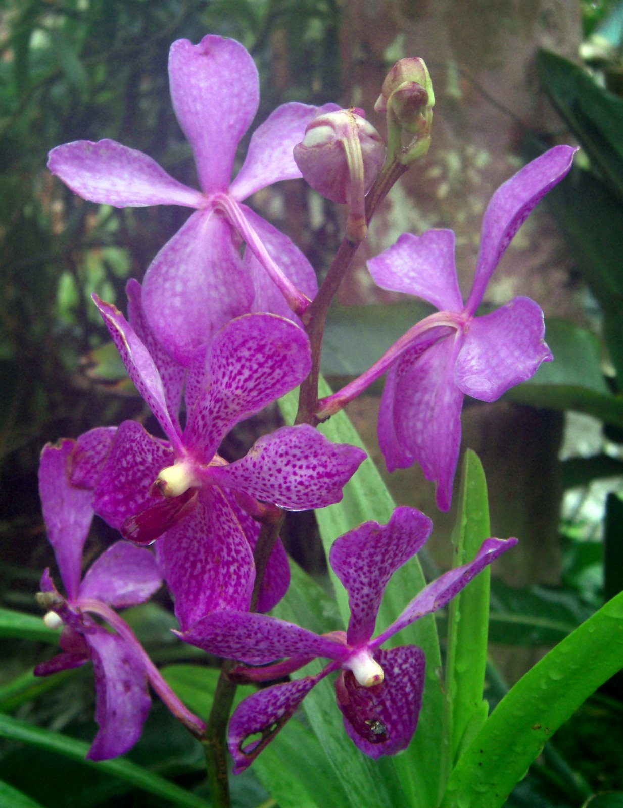 Purple flowers Da Lat